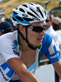 4e étape (Col du Grand Colombier) du Tour de l'Ain 2011